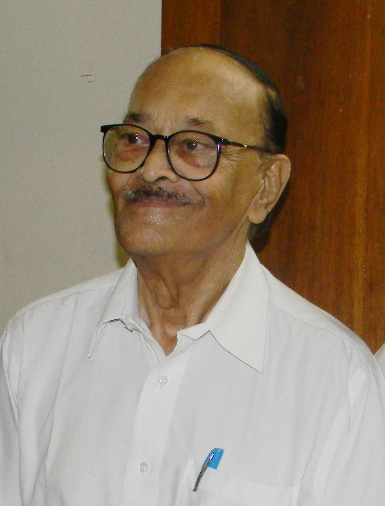 ଓଡ଼ିଆ: Odia Veteran Actor